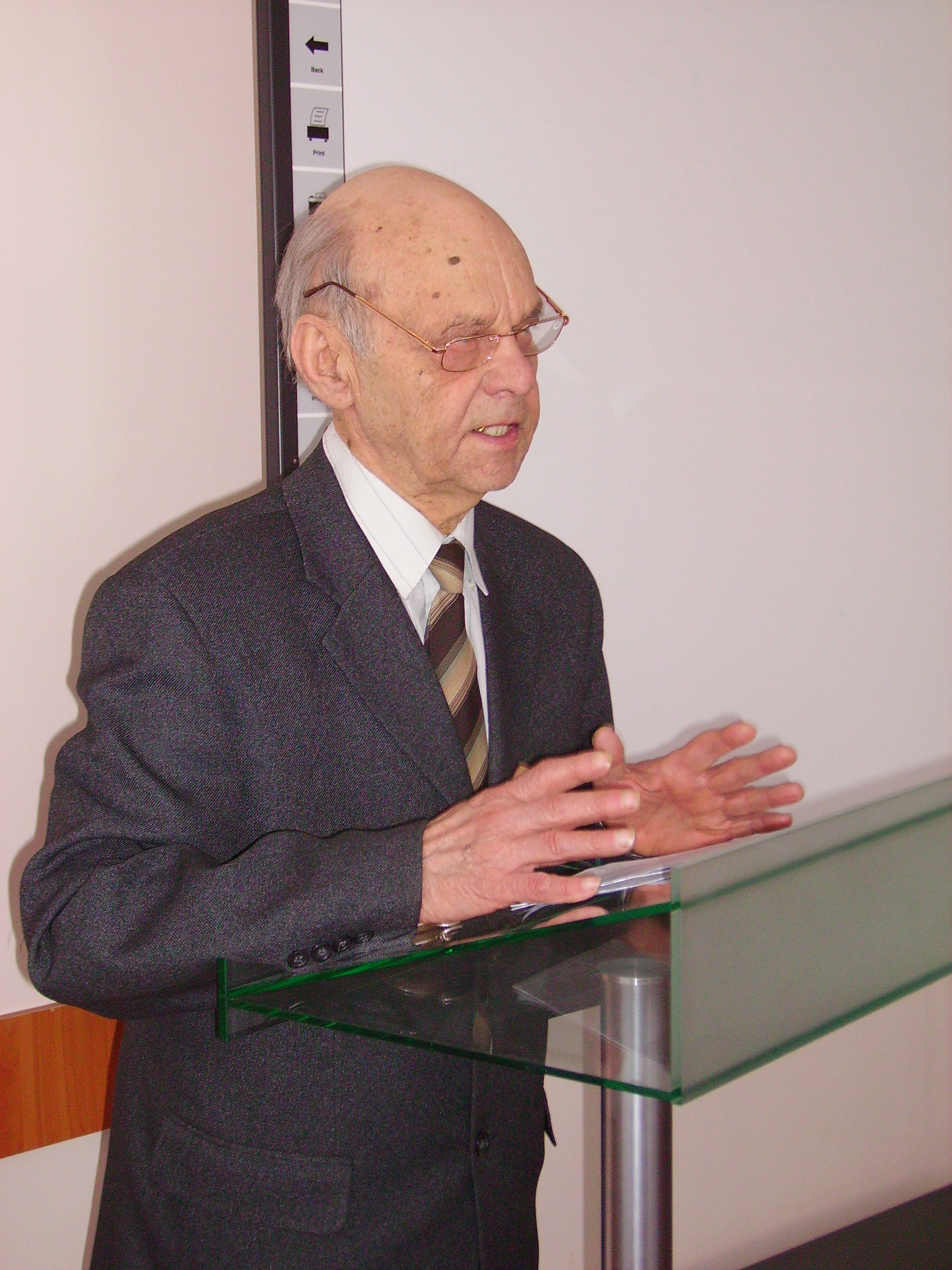 профессор Логунов В.И. выступает на международной конференции Воронеж, 29 марта 2006 года